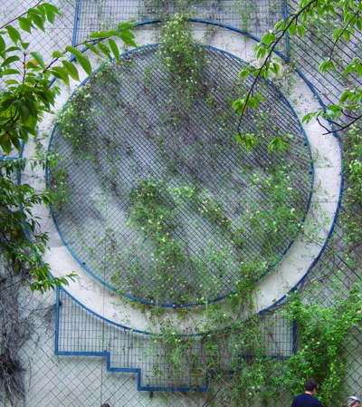 Réalisation en treillage métallique de Jean-Max Albert pour le jardin Héloise et Abélard Paris XIII